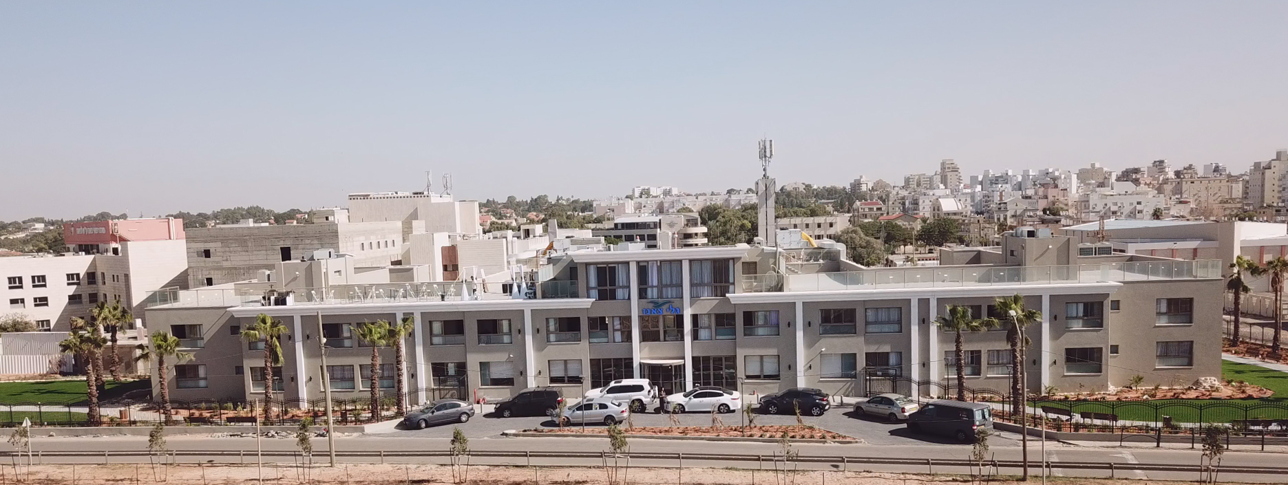 מלון גלי צאנז נתניה, באדיבות רווח הפקות צילומי וידאו בית שמש